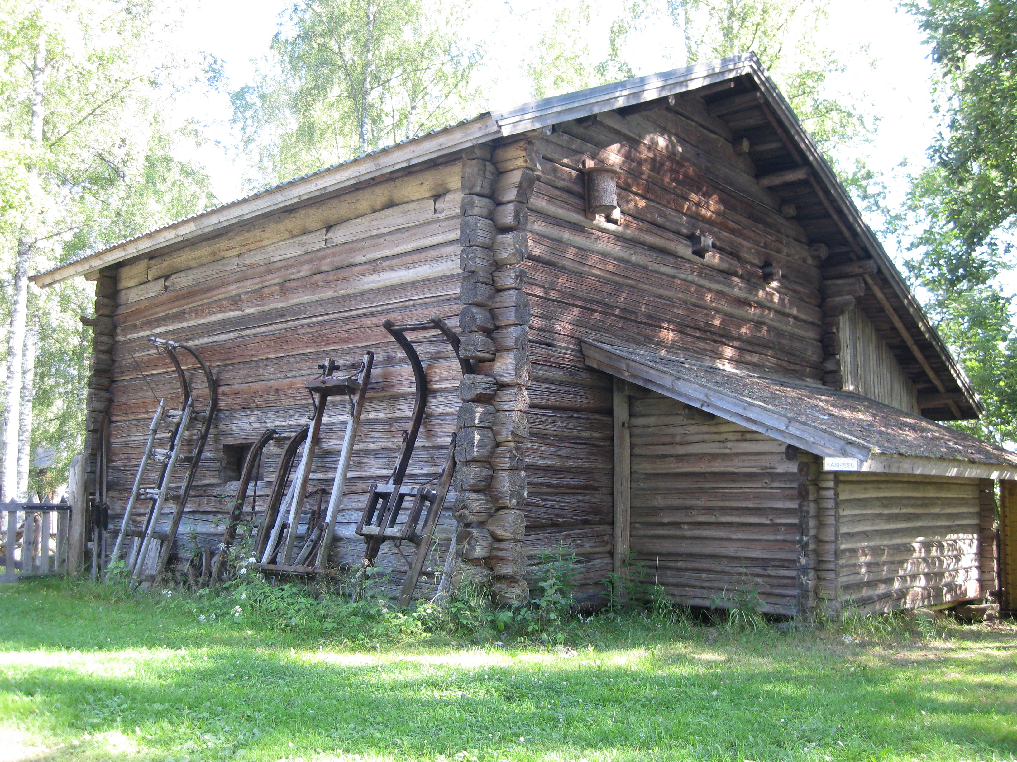 Hakamäen museoalue Savitaipaleella. Kuvassa on riihi ja sen seinustalla rekiä.